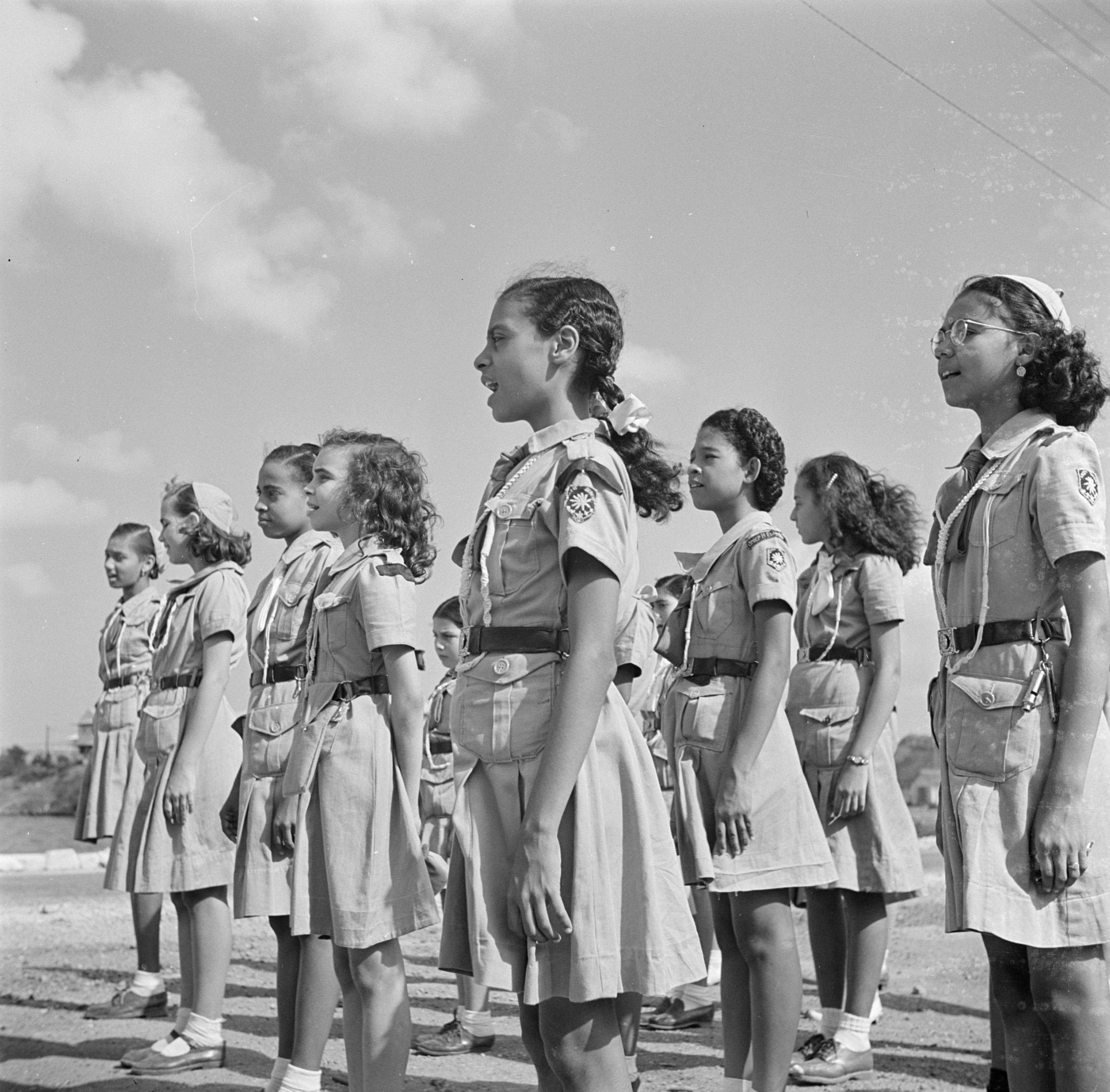 Collectie / Archief : Fotocollectie Van de Poll Reportage / Serie : Reis naar Suriname en de Nederlandse Antillen Beschrijving : Padvinderij op Curaçao Datum : 1947 Locatie : Curaçao Trefwoorden : padvinderij Fotograaf : Poll, Willem van de, [onbekend] Auteursrechthebbende : Nationaal Archief Materiaalsoort : Negatief (zwart/wit) Nummer archiefinventaris : bekijk toegang 2.24.14.02 Bestanddeelnummer : 252-7614